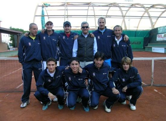 Il Team della Torres Tennis di Sassari, che ha disputato il campionato italiano di tennis "serie A1 maschile" nel 2007, giungendo ai Play-Off.